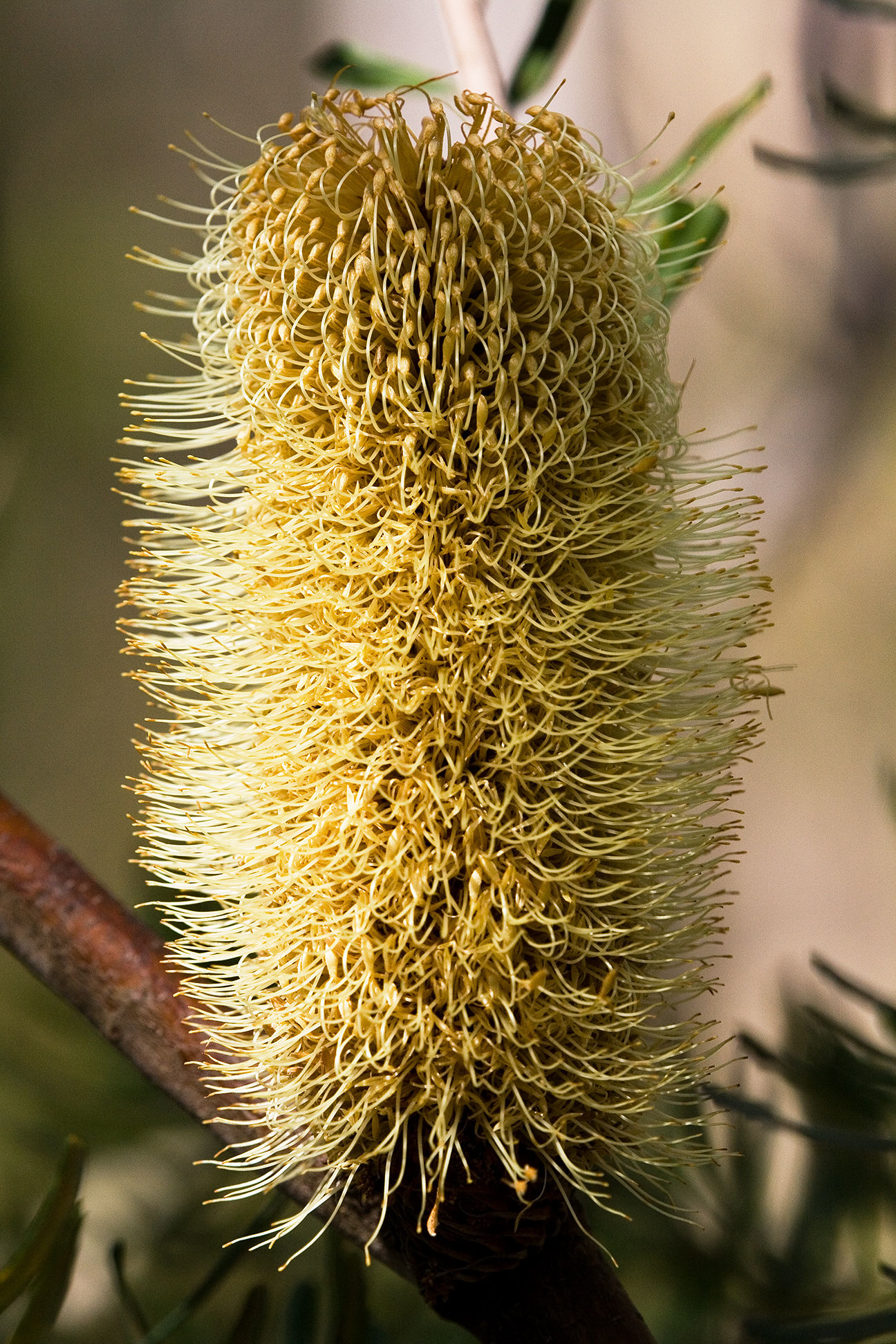 1.2 only